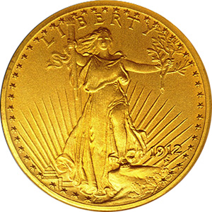 1912, Double Eagle, Saint Gaudens, Obverse